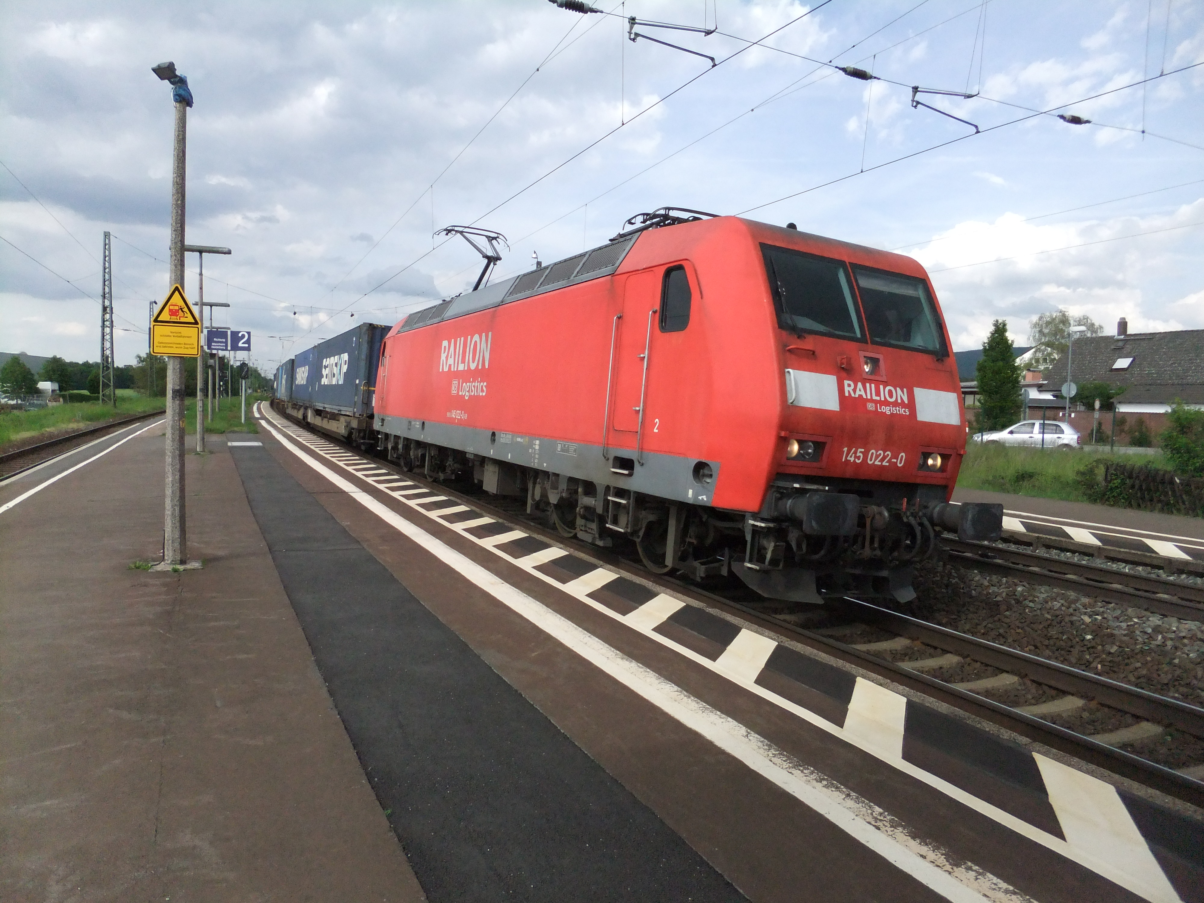 DBAG-Baureihe 145 mit Güterzug auf der Main-Neckar-Eisenbahn im Bahnhof Bickenbach (Bergstraße)